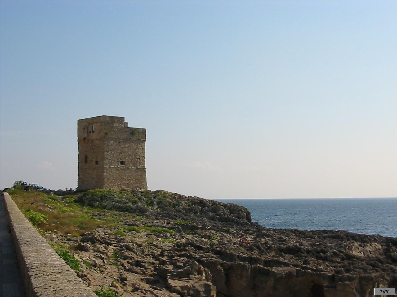 Torre Palane di Marina Serra di Tricase, provincia di Lecce, Salento, Regione Puglia, Italia, Europa.